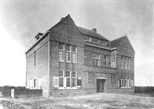 Anonymous. De Vonk vacation hostel, Noordwijkerhout. c 1918. From De Stijl, vol. 2, nr. 1 (november 1918): facing p. 12.